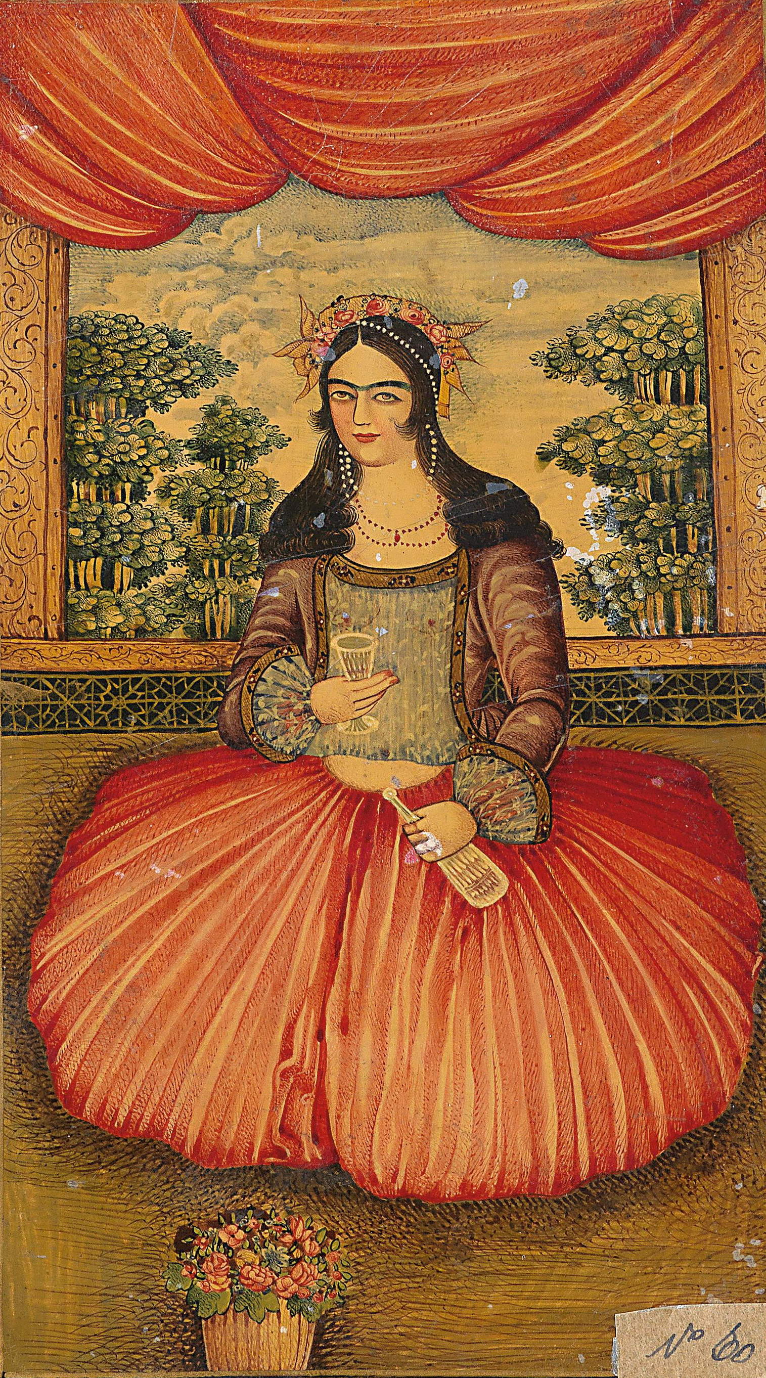 Miniatur-Malerei (Kombinations-Bild mit insgesamt drei Bildern), ca. 18,7 cm x 11,2 cm; 19. Jh.; Qajaren-Dynastie